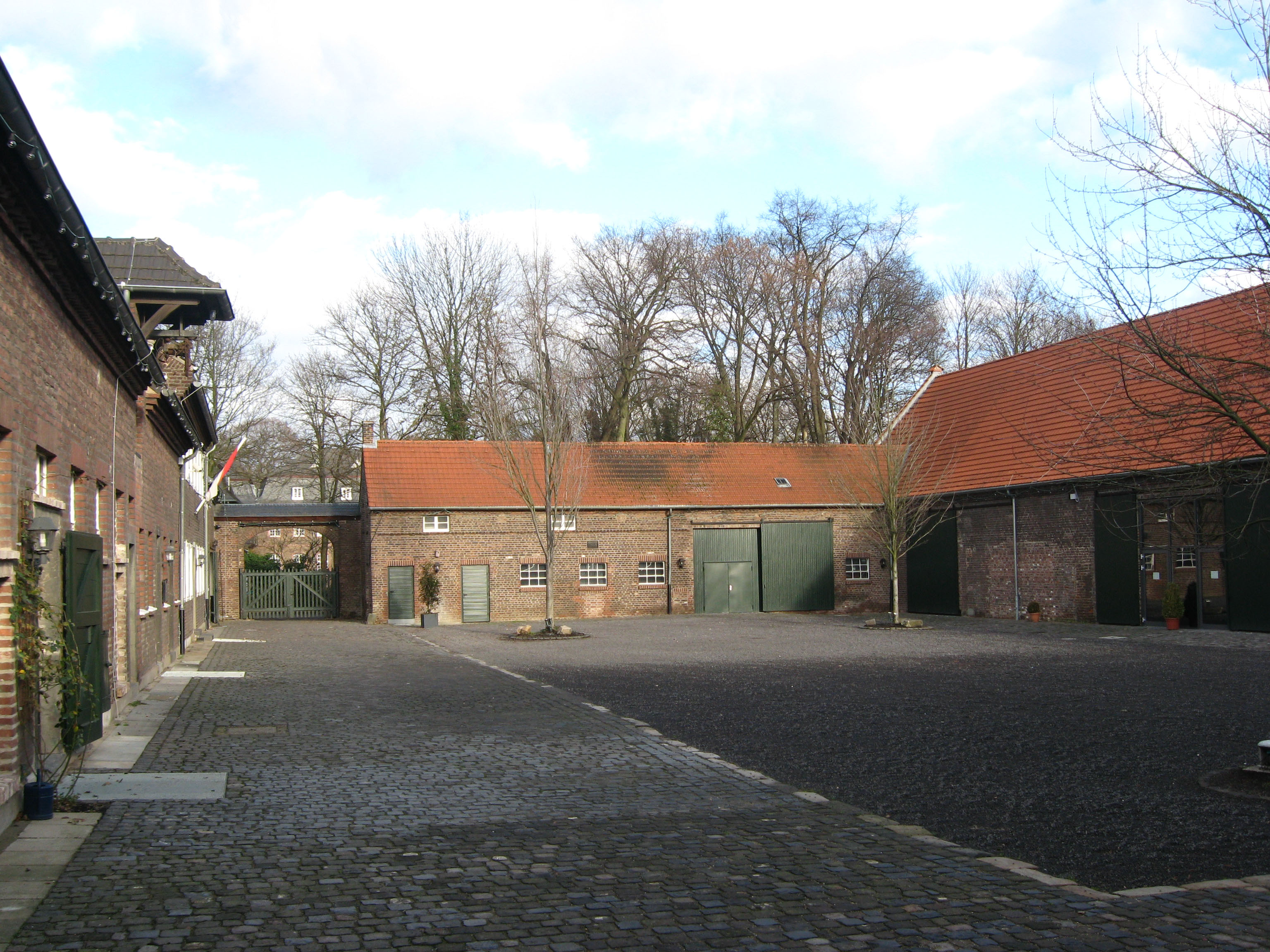 Historischer Eltzhof in Köln-Wahn (Teilansicht) Datum: 16.01.2011 Urheber: B. Neulich alias Benutzer:Neulich im Roxy Kino Quelle: Privates Fotoarchiv des Urhebers